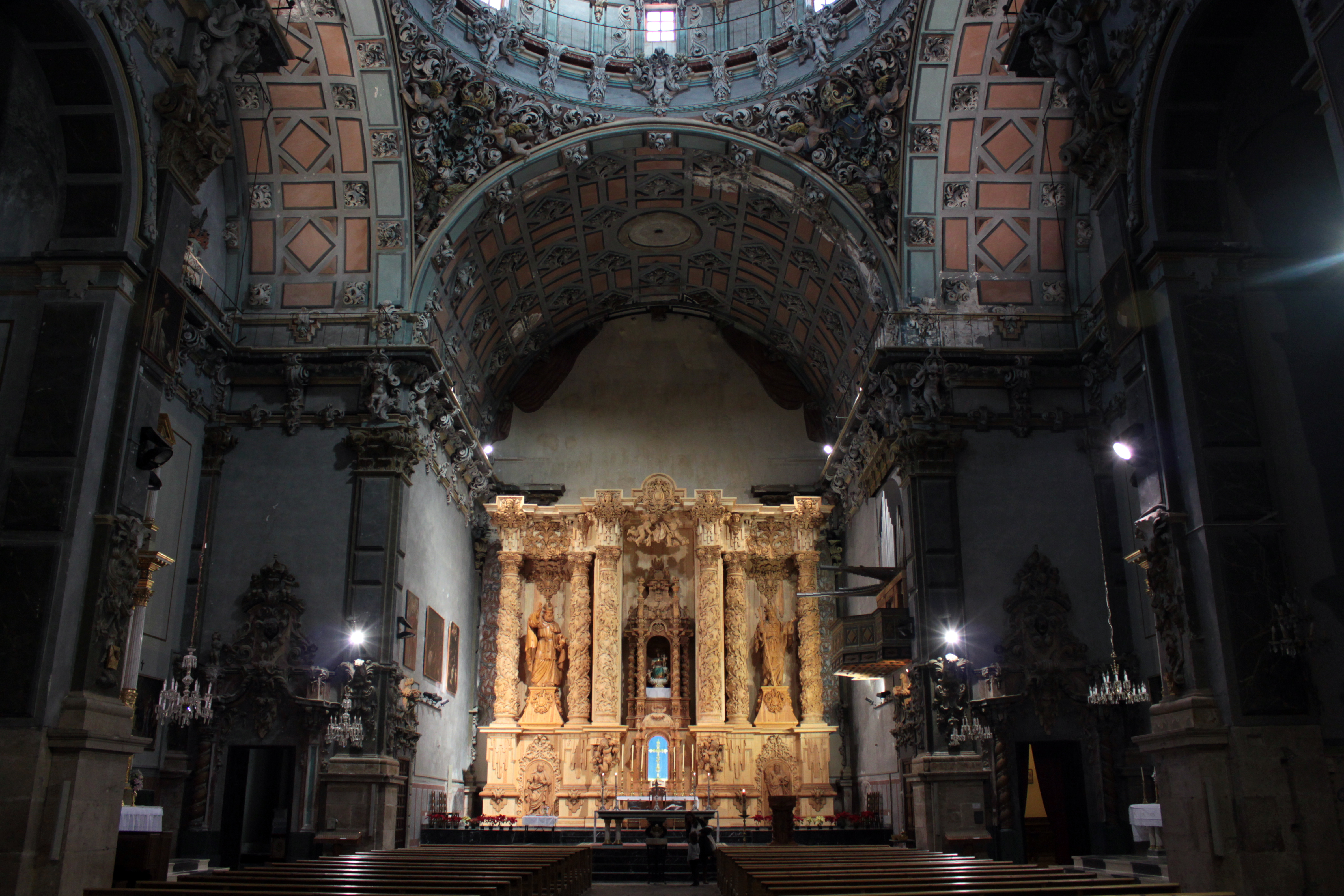 Interior de la Iglesia de los Ángeles de Chelva, provincia de Valencia, Comunidad valenciana, España.